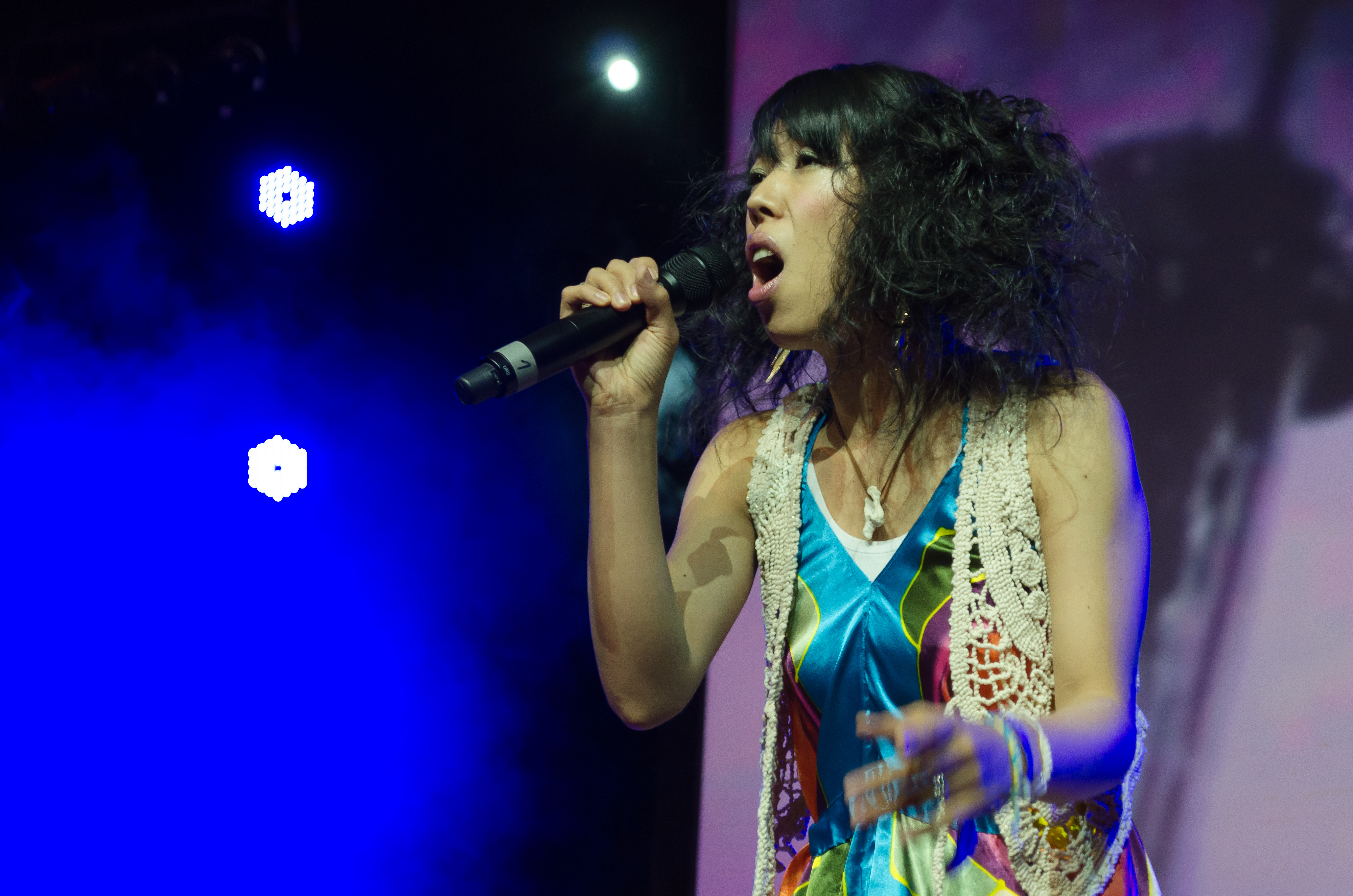 Die japanische Sängerin Kanako Itō bei ihrem Auftritt auf der AnimagiC 2012 in Bonn, Deutschland